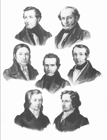 Göttinger Sieben (zeitg. Darstellung)